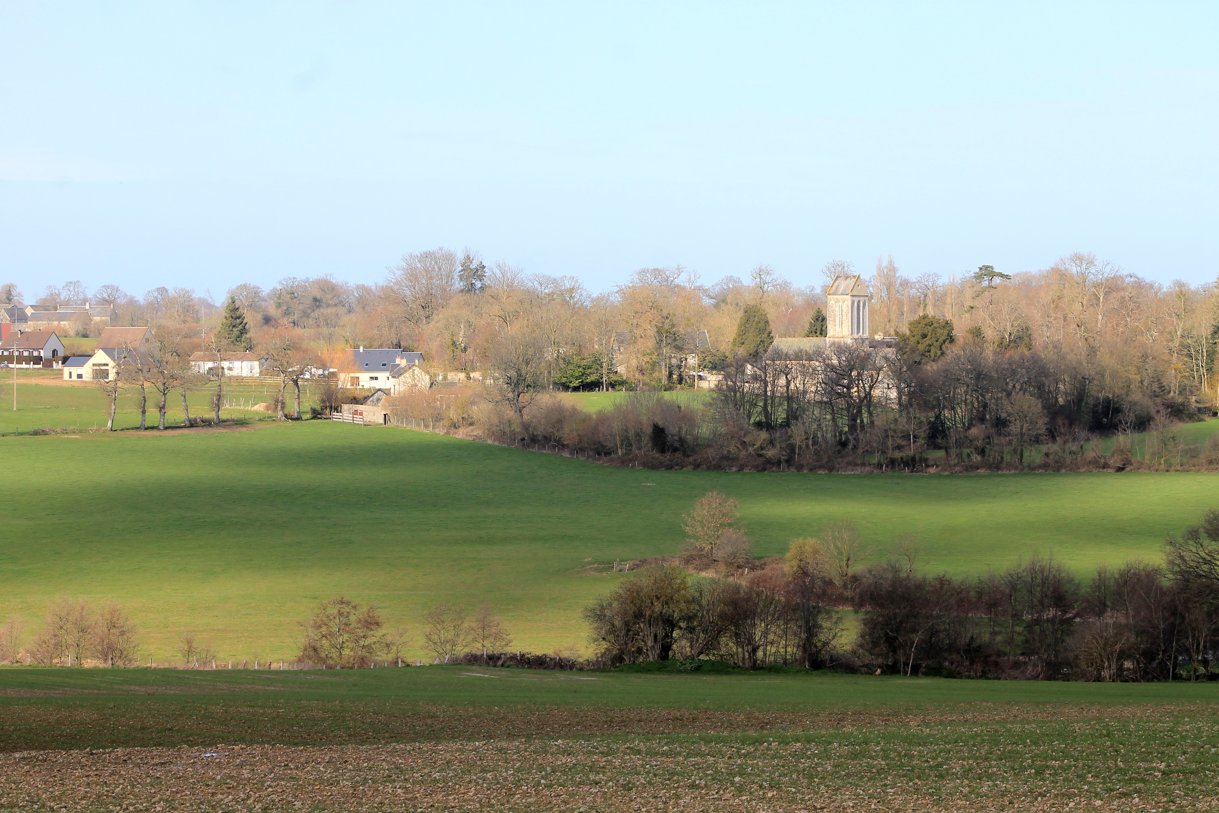 Vue de Ranchy (Calvados)